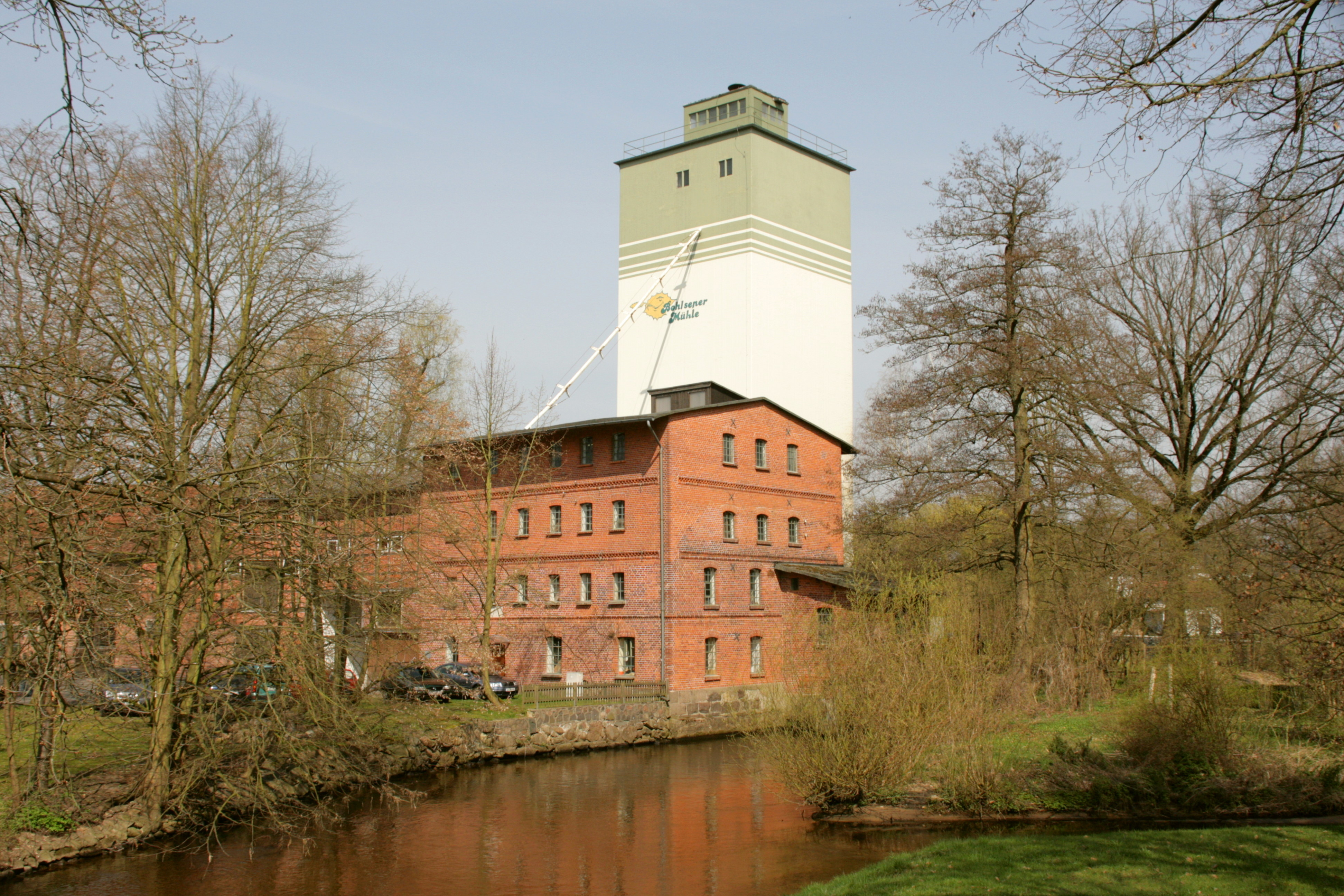 Wassermühle Bohlsen an der Gerdau, Mühlenstraße 1 in Gerdau-Bohlsen